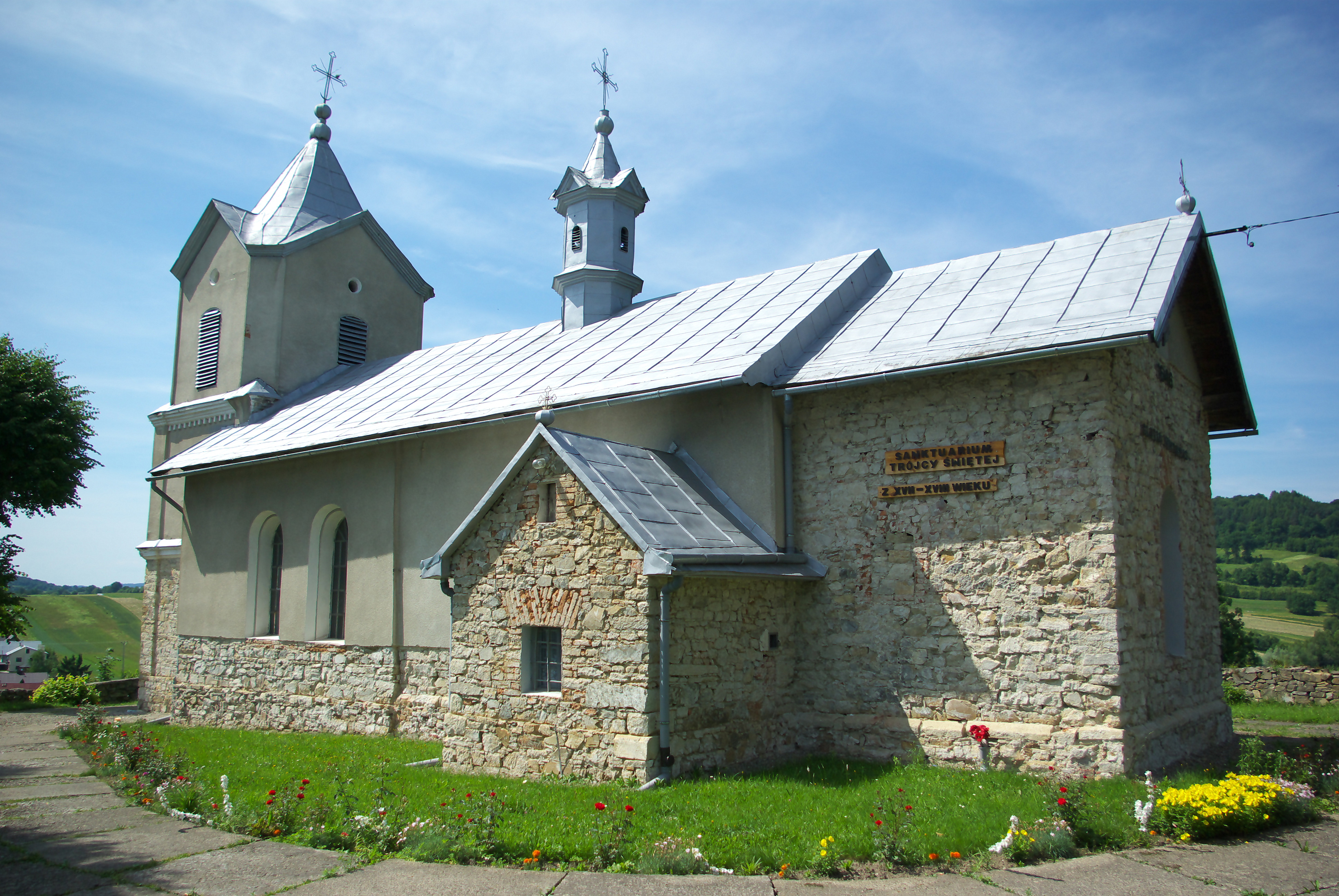 Zespół dawnej cerkwi greckokatolickiej. p.w. Zaśnięcia NMP w Trepczy: dawna cerkiew greckokatolicka p.w. Zaśnięcia NMP